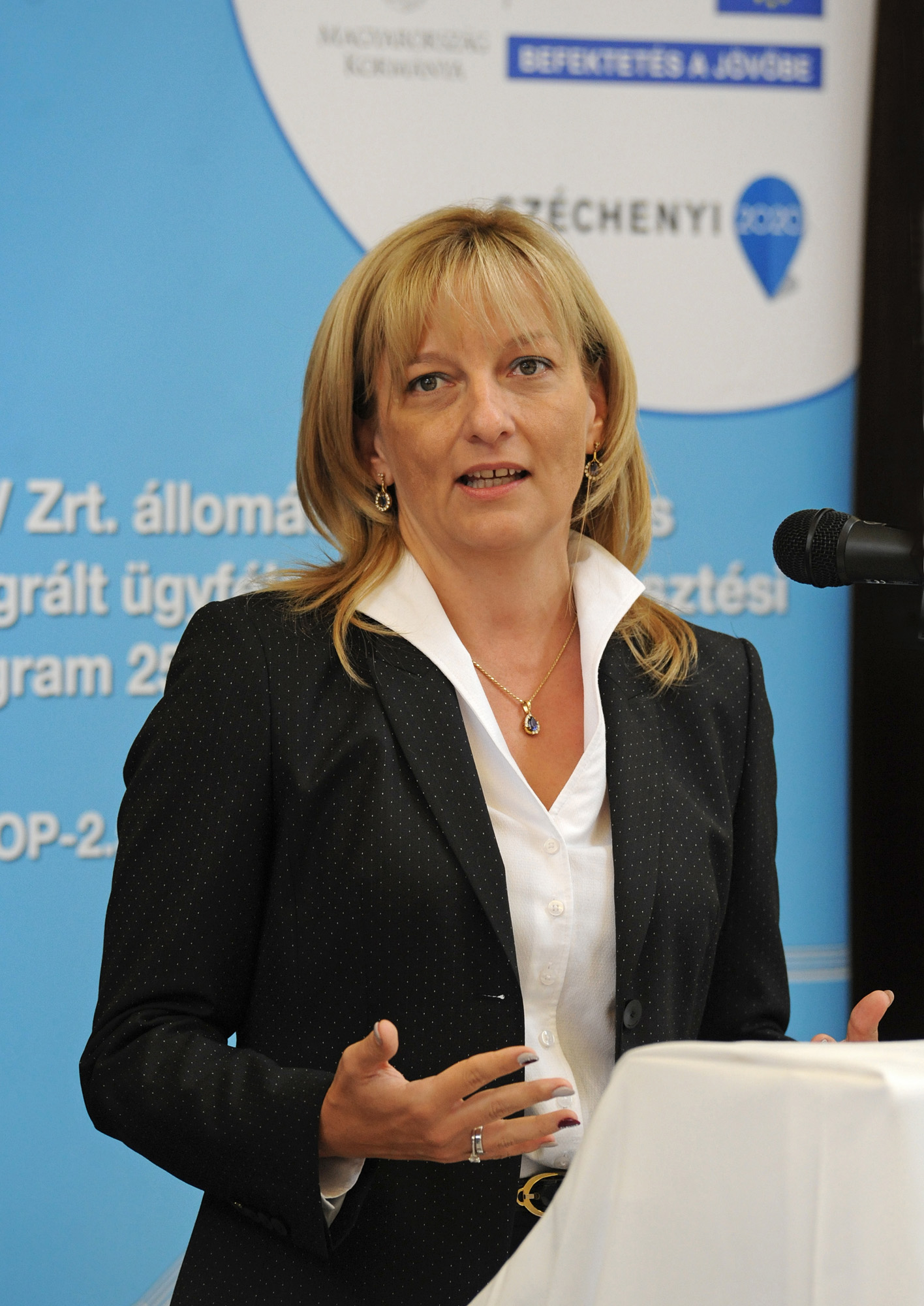 A MÁV Zrt. elnök-vezérigazgatója